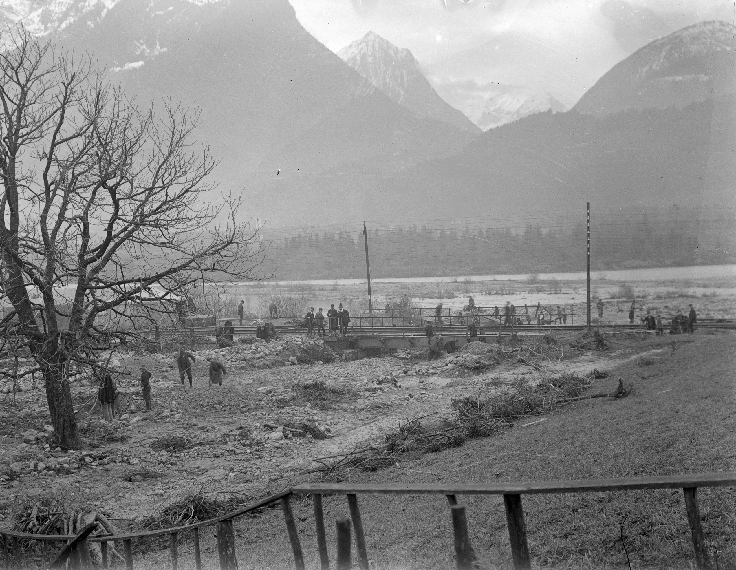 Bludenz, Galgentobel, Naturkatastrophe, Felssturz 1918; Eine Gruppe von Personen ist mit händischen Aufräumarbeiten beschäftigt (Text: Michael Laublättner) (das Bild ist im Original seitenverkehrt, Blick nach Südwest ins Brandner Tal. In der Mitte die Wasenspitze)